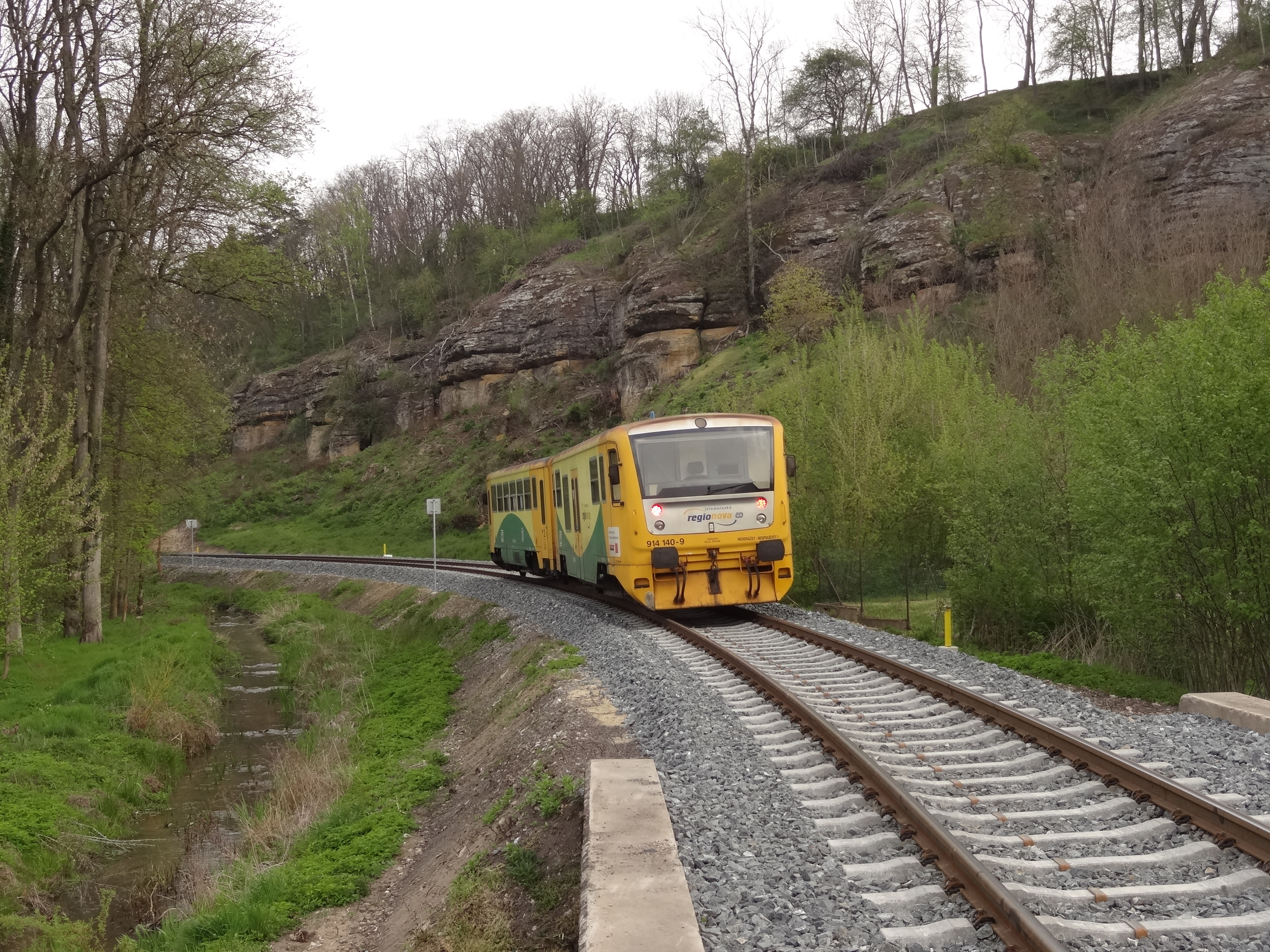 Lhotka u Mělníka - u železniční zastávky